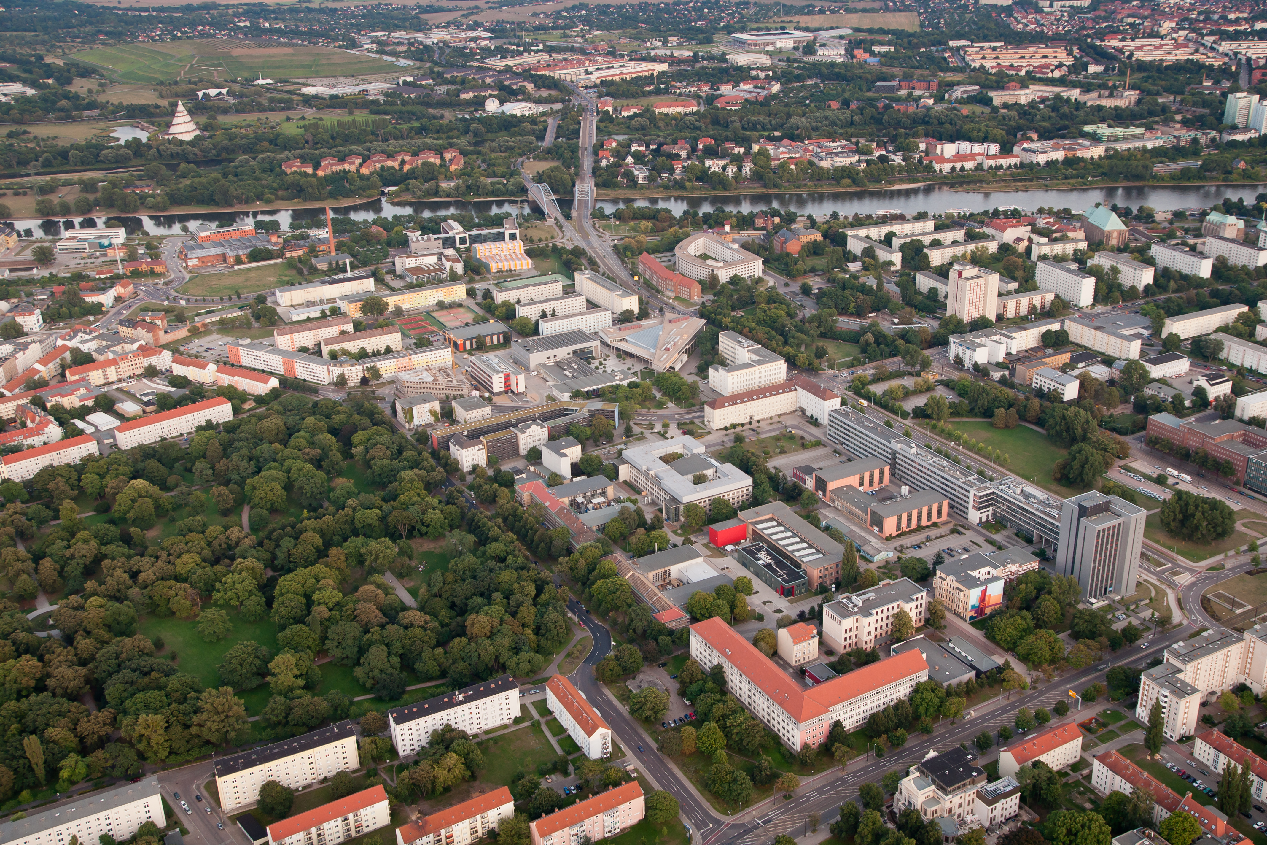 Blick aus einem Ballon über den Nordcampus der Universität Magdeburg